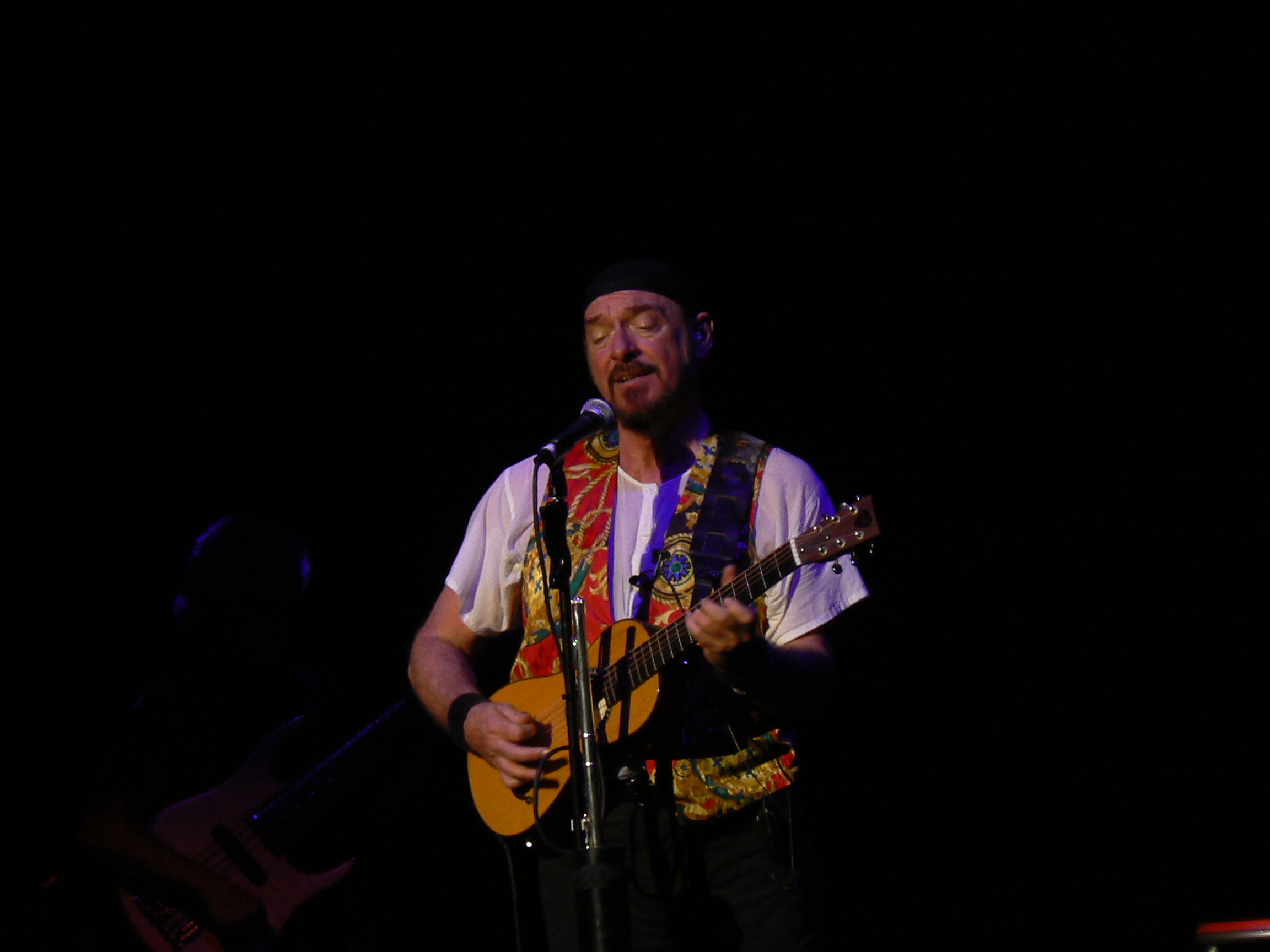 Ian Anderson (Jethro Tull) en concert à Forest National (Bruxelles) en Belgique le 01 juin 2007.